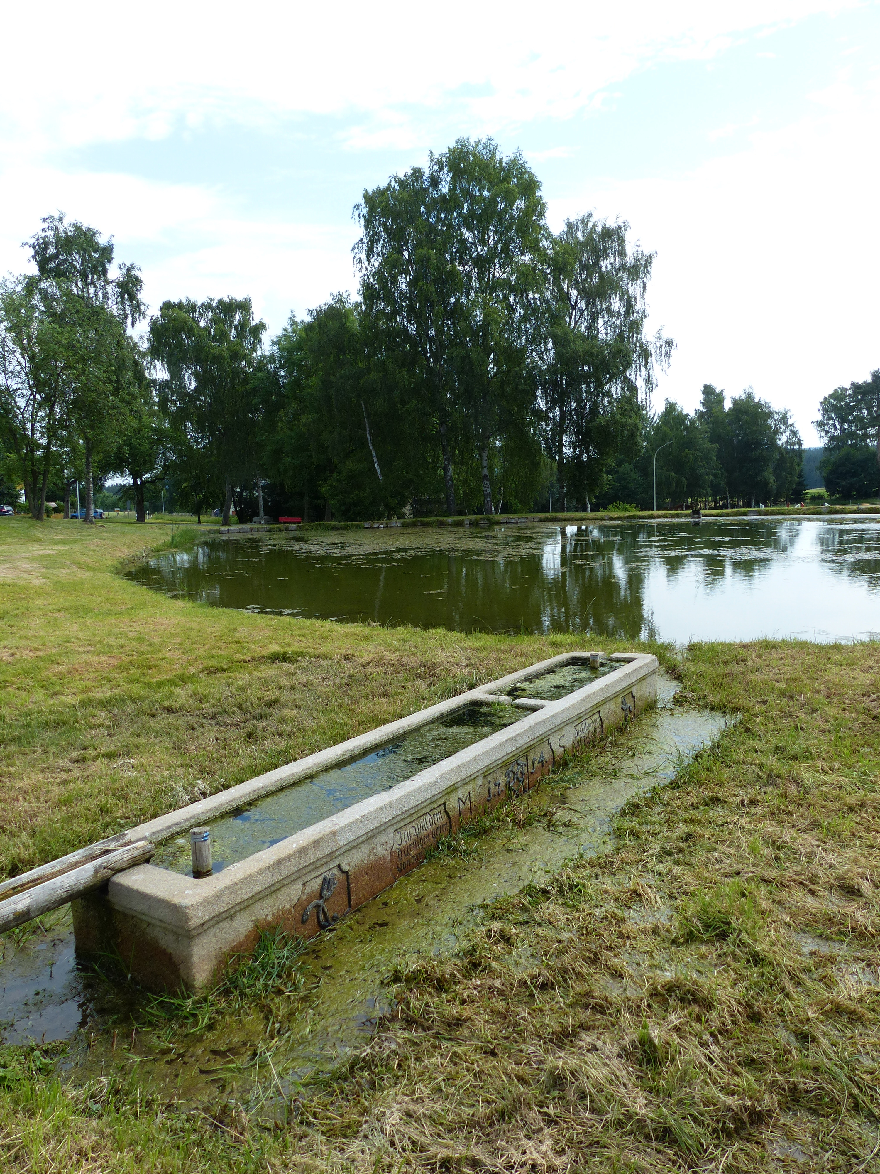 Bilderserie Kleindenkmale und Ortsansichten von Rehau